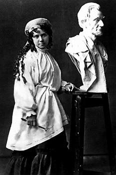 Vinnie Ream (1846-1914)